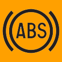 Témoin ABS